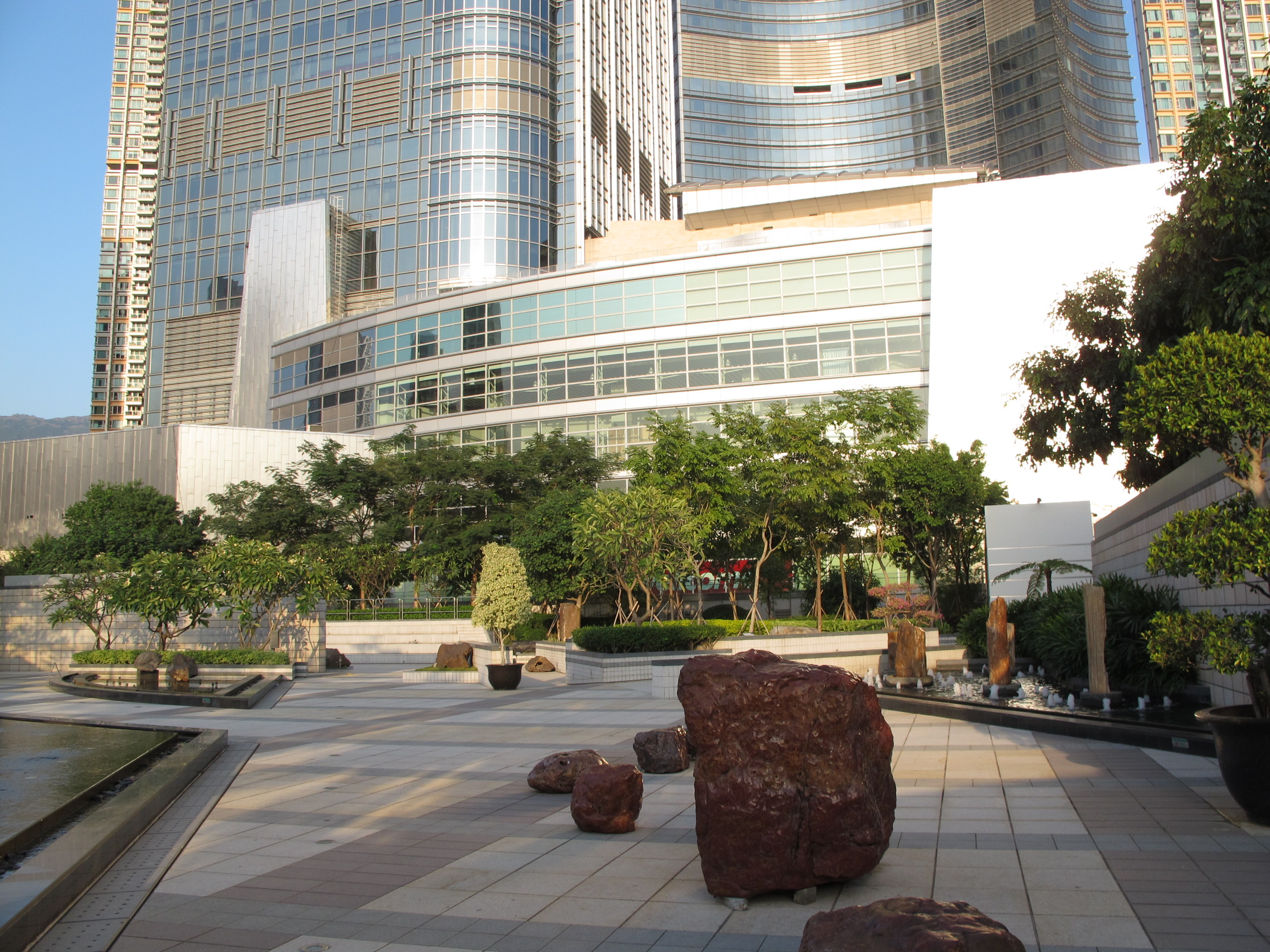 Nina Fossil Garden